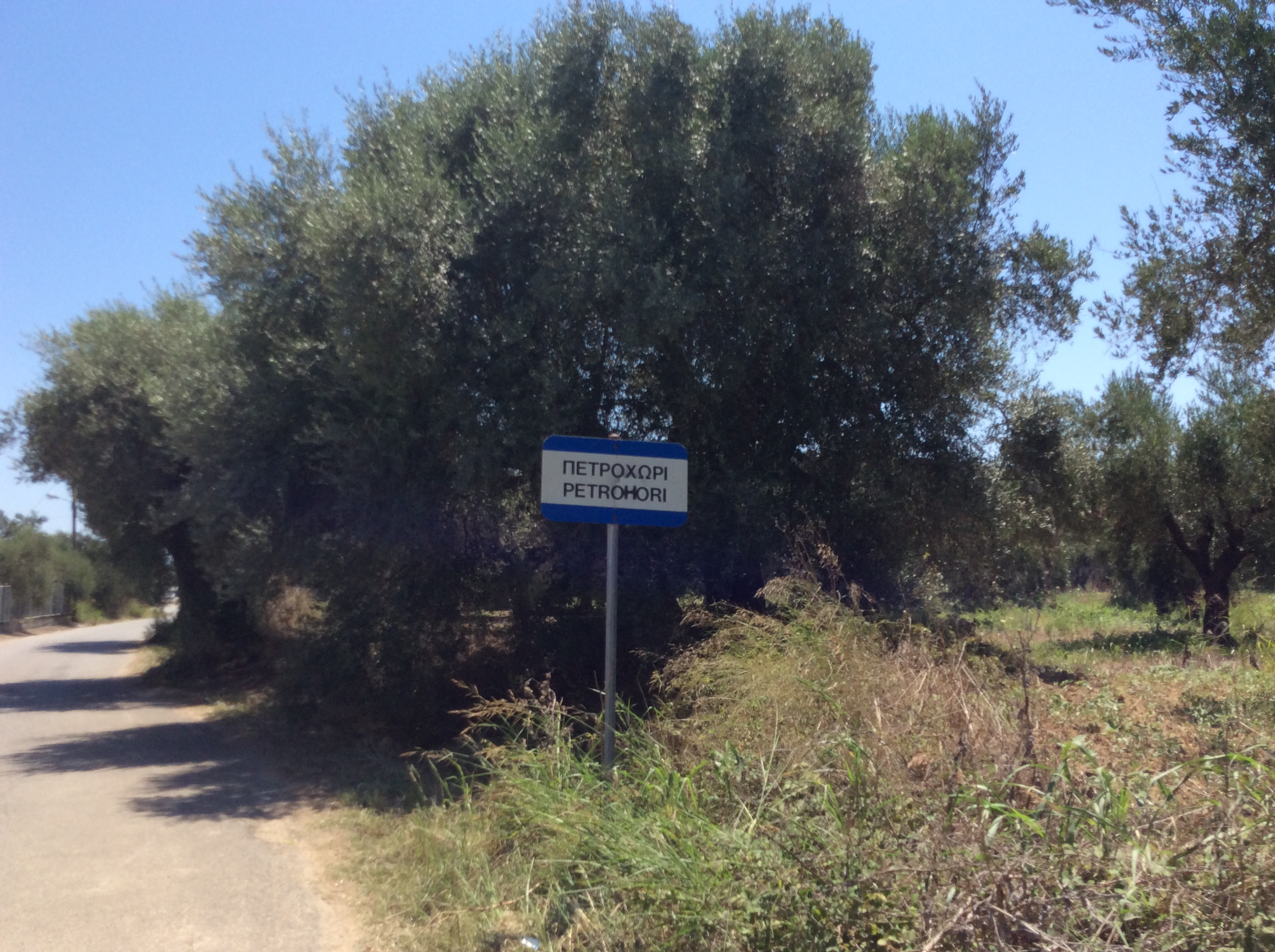 Πετροχώρι Μεσσηνίας - Είσοδος από τα ανατολικά.